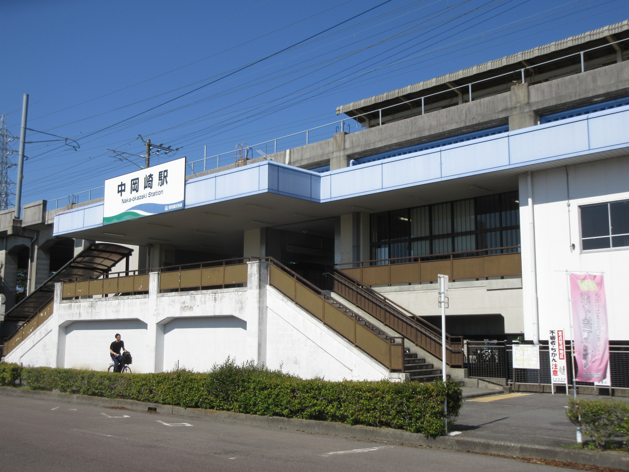 中岡崎駅、東口